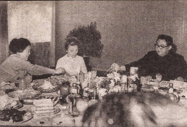 María Estela Martínez con el líder de la RPDC, Kim Il-sung.